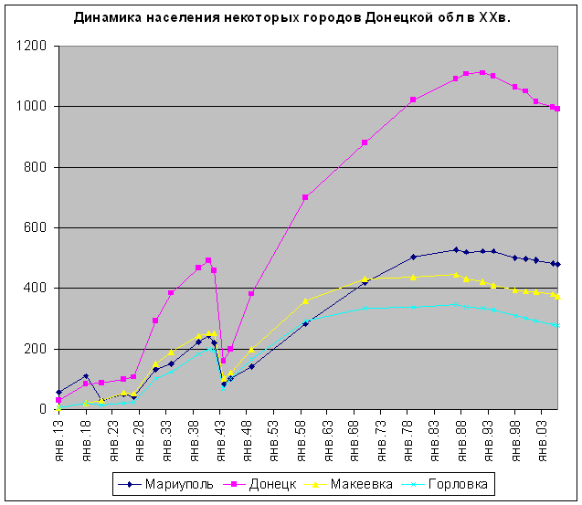 рост населения ариуполя и городов Донецкой области в ХХ веке.